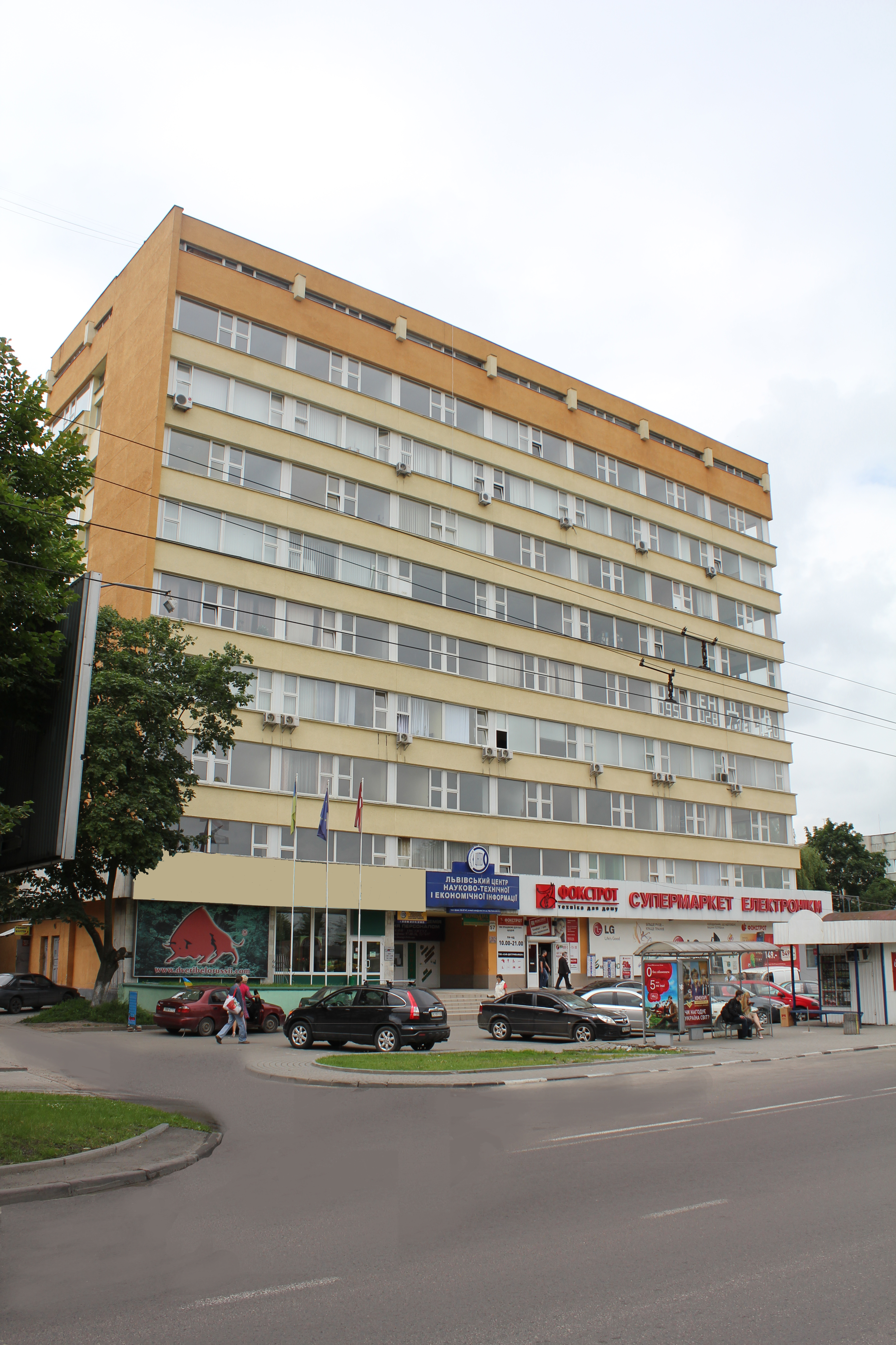 Будівля на просп. В. Чорновола, 57, де розміщене Почесне консульство Латвійської Республіки у Львові.